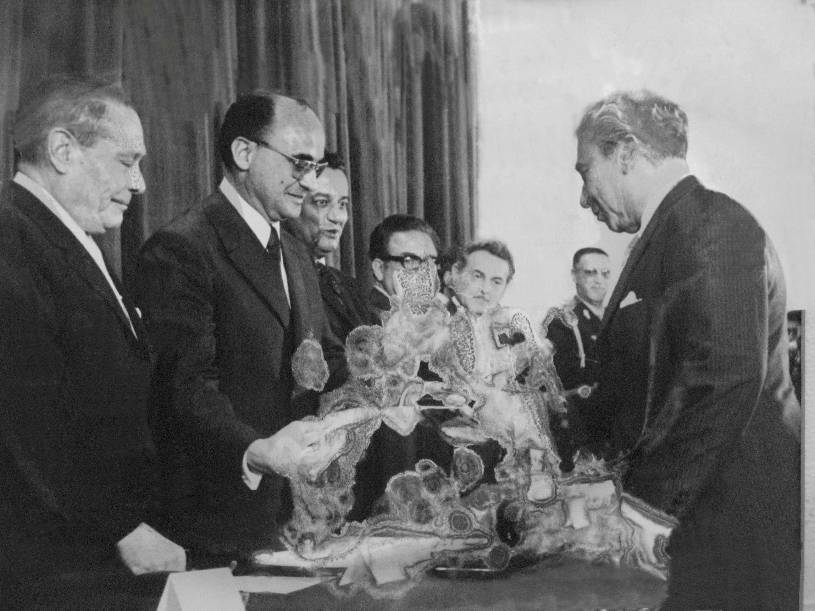 Ingeniero Oscar Vega Argüelles y el Ex Presidente mexicano Luis Echeverria Alvarez